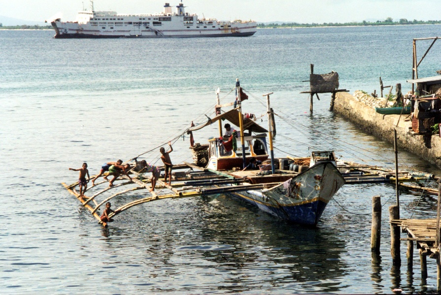 Philippinen Basilan Seezigeuner